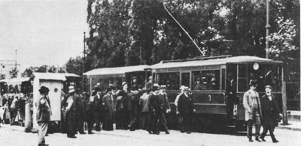 Triebwagen 3 der Berliner Ostbahnen mit angehängtem Beiwagen nahe der Rampe zum Spreetunnel in Stralau